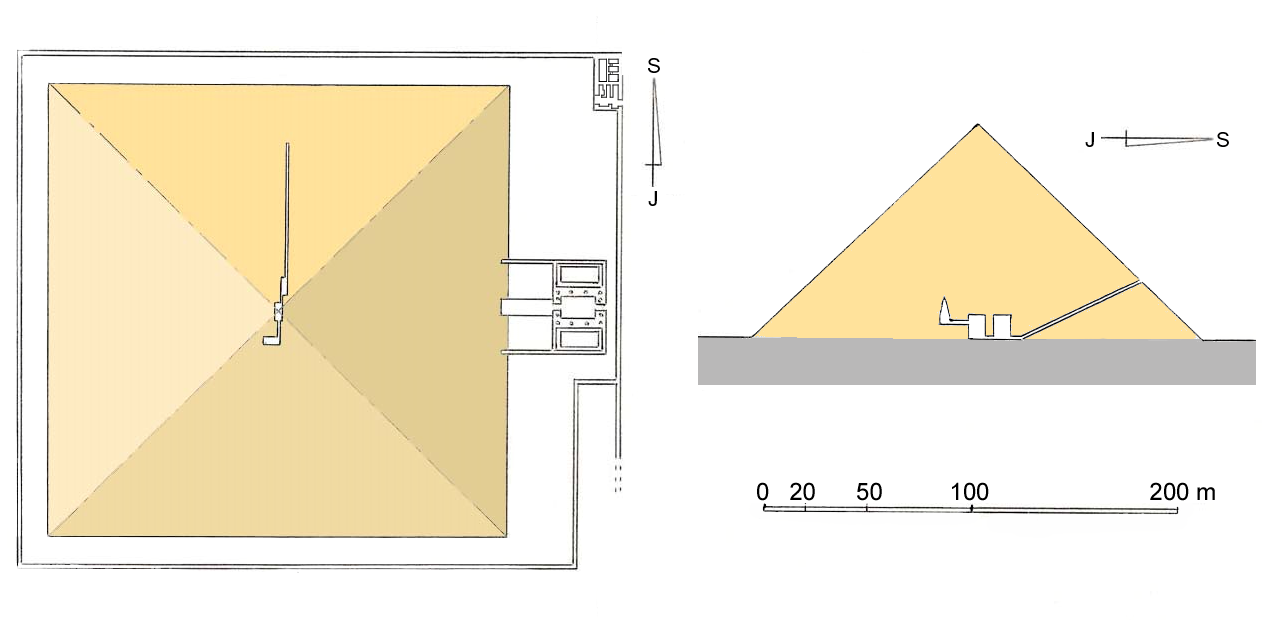 plán Červené pyramidy, pohled shora a z boku: první část kresby tvoří pohled na pyramidu shora a druhou částí je severojižní řez pyramidy. Do pyramidy se vstupuje chodbou (na schématu zprava), která nejprve vede pod strmým úhlem dolů k základně pyramidy a poté pokračuje ve vodorovné pozici. Chodba ústí do první předsíně, kterou s druhou předsíní spojuje krátká pasáž. V druhé předsíni je umístěn vchod do pohřební komory.